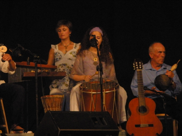 Aixama en directe. Agost 2008.